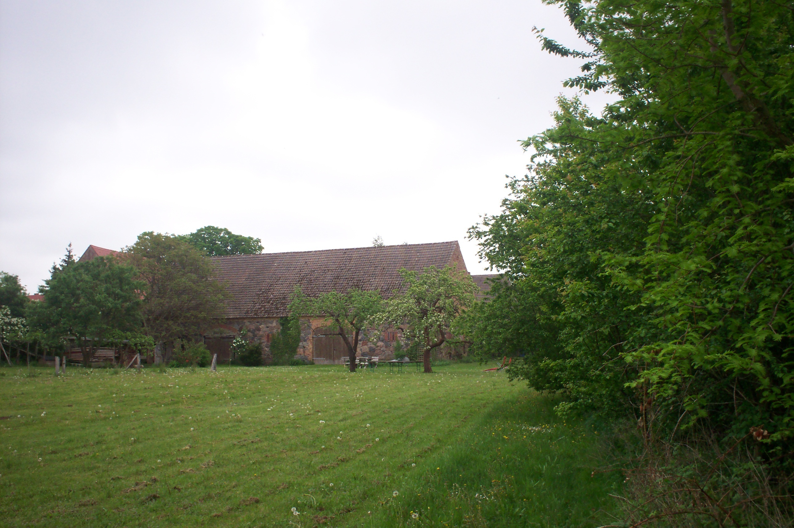 Banzendorf Nr. 70, ehemalige Banzendorfer Kulturscheune, Ansicht von Westen